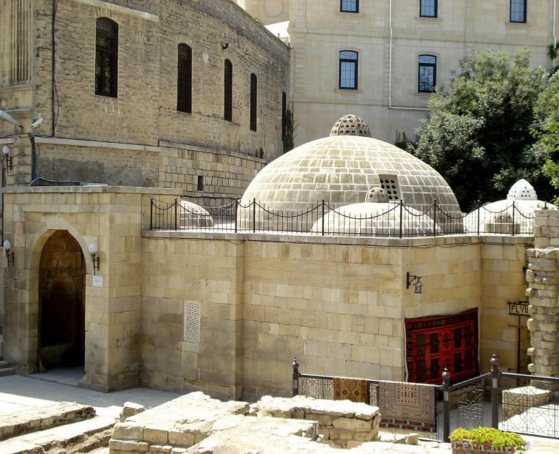 Баня Гаджи Гаиба